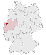 Kreis Wesel, North Rhine-Westphalia, Germany